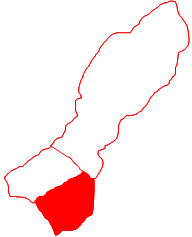 Ubicación de la parroquia La Victoria, municipio Valmore Rodríguez, estado Zulia, Venezuela